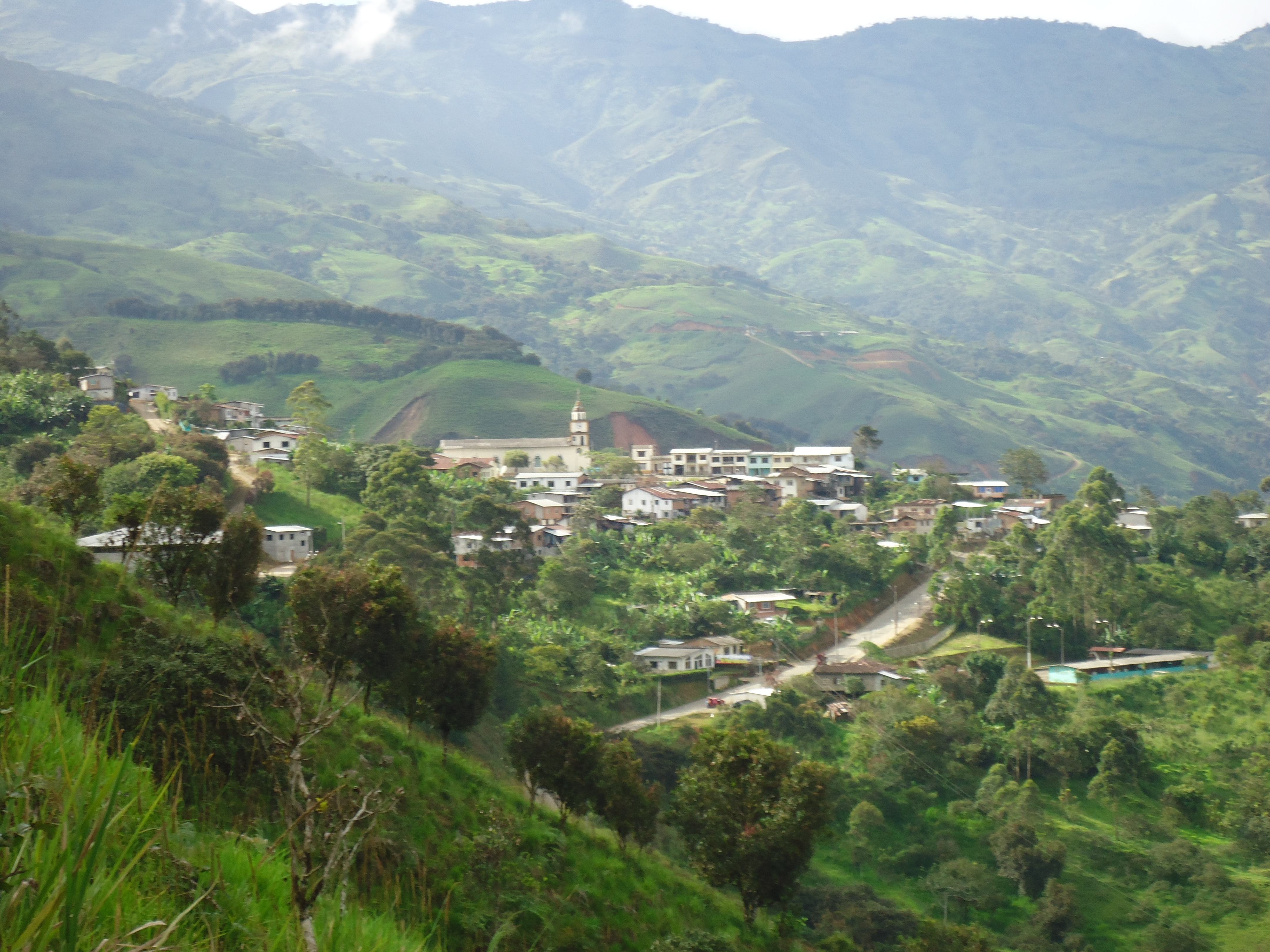 Vista panorámina de Ayapamba.